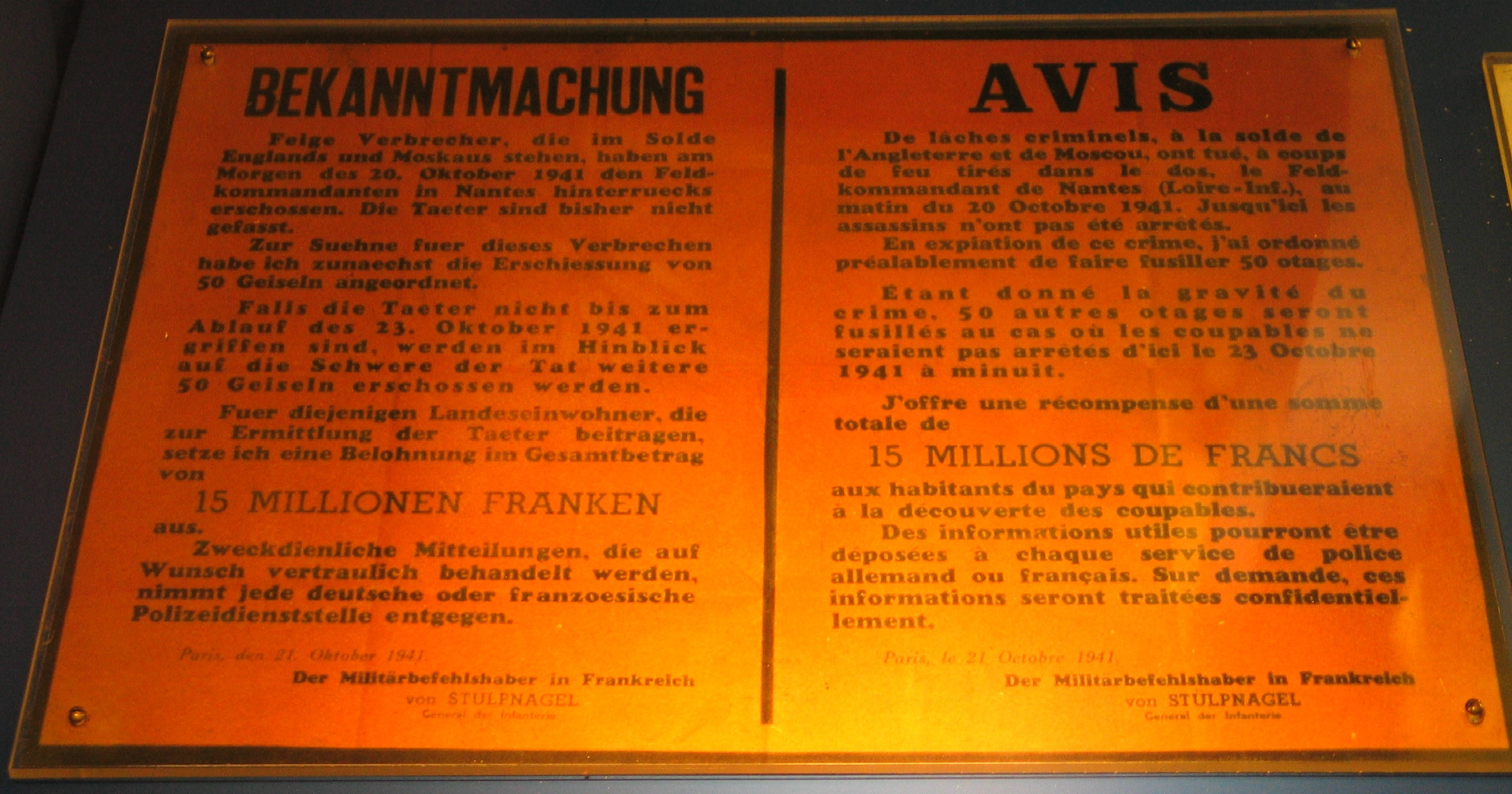 Exposition métro Guy Môquet, Paris